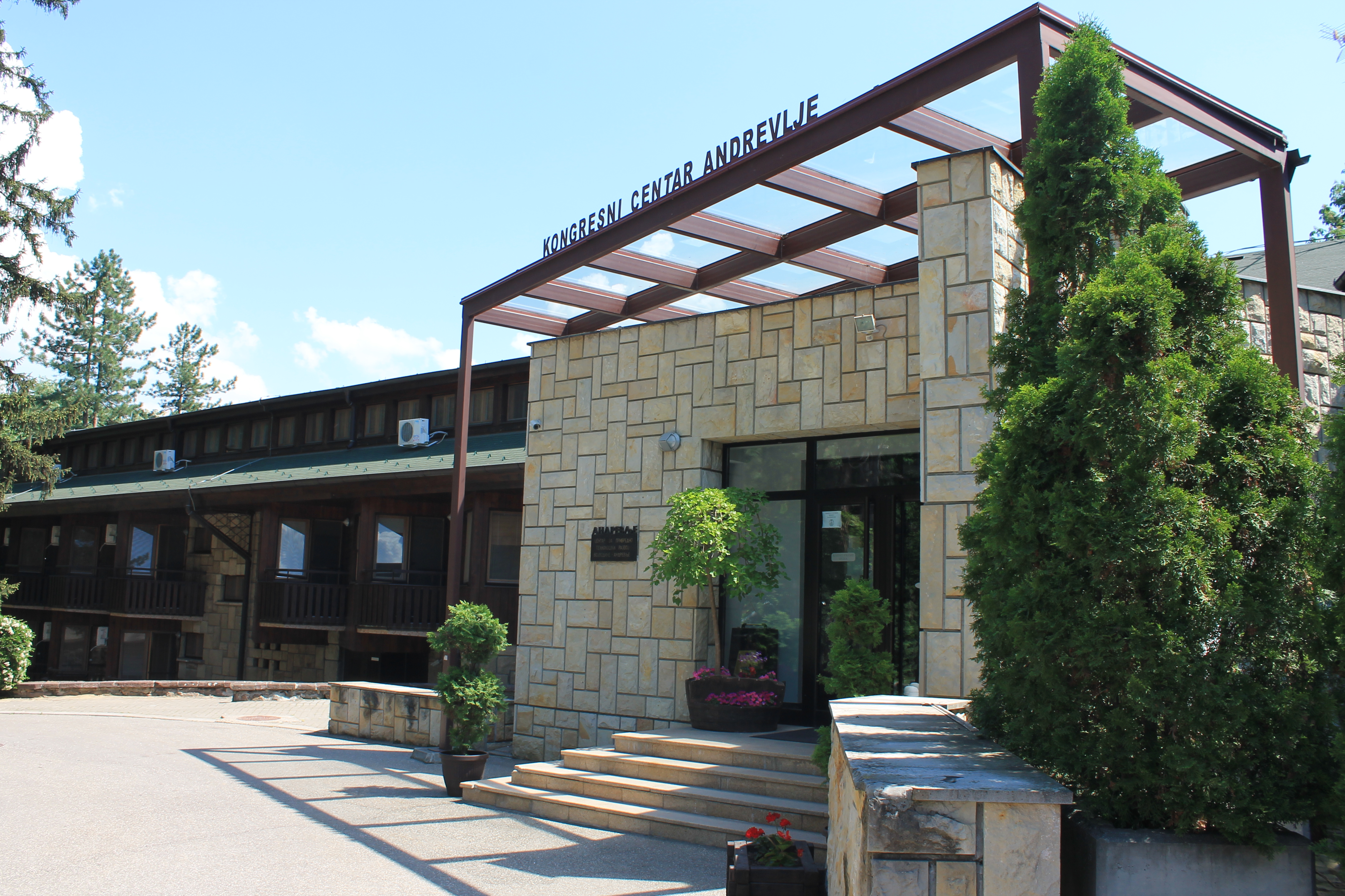 Izletište Andrevlje na Fruškoj gori